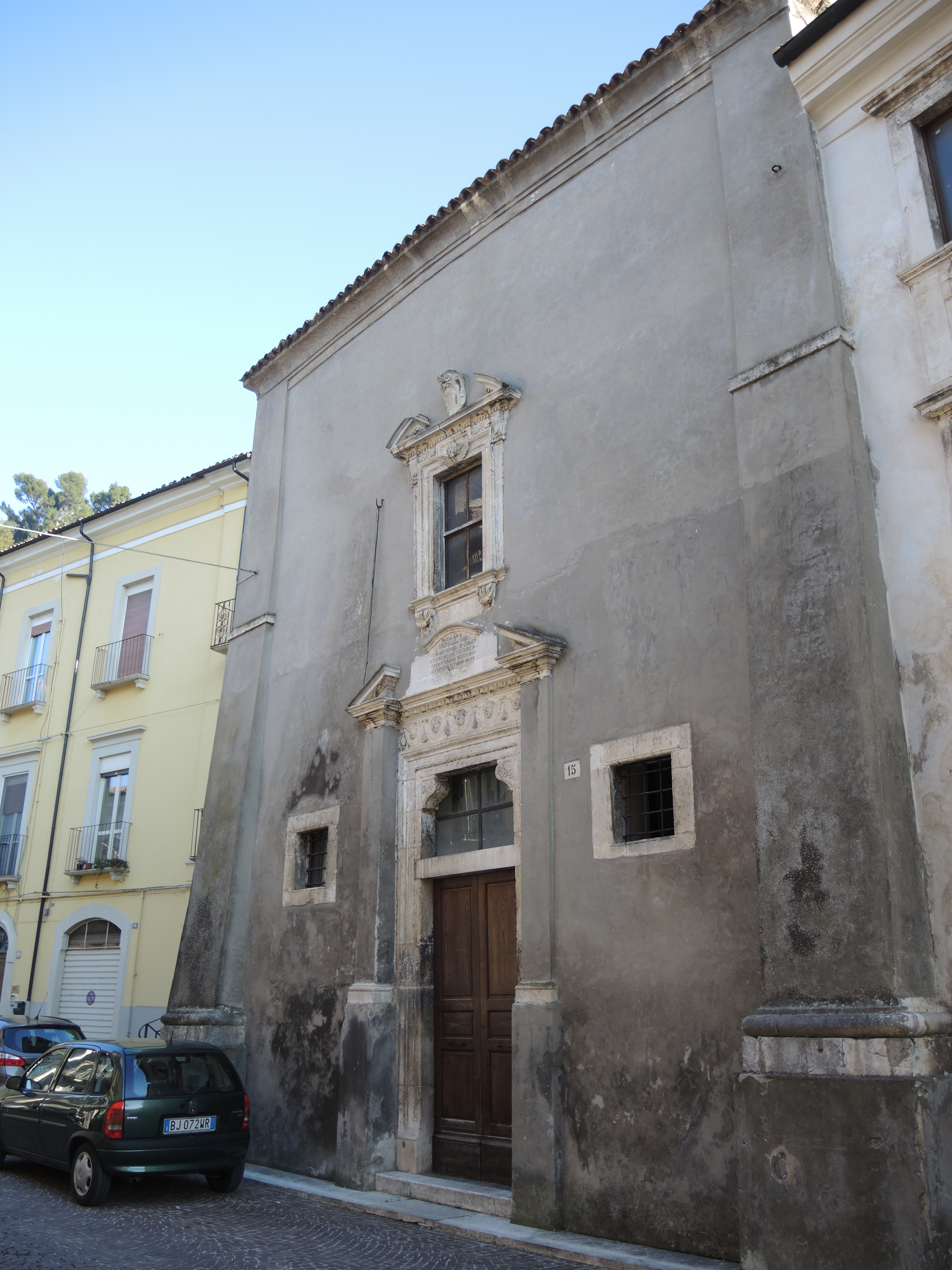 Popoli (PE) - Chiesa Via Giuseppe Garibaldi 15